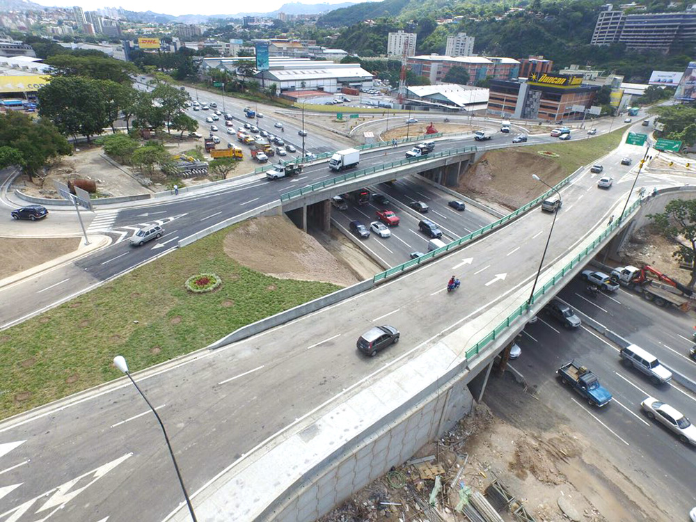 Distribuidor Los Ruinces